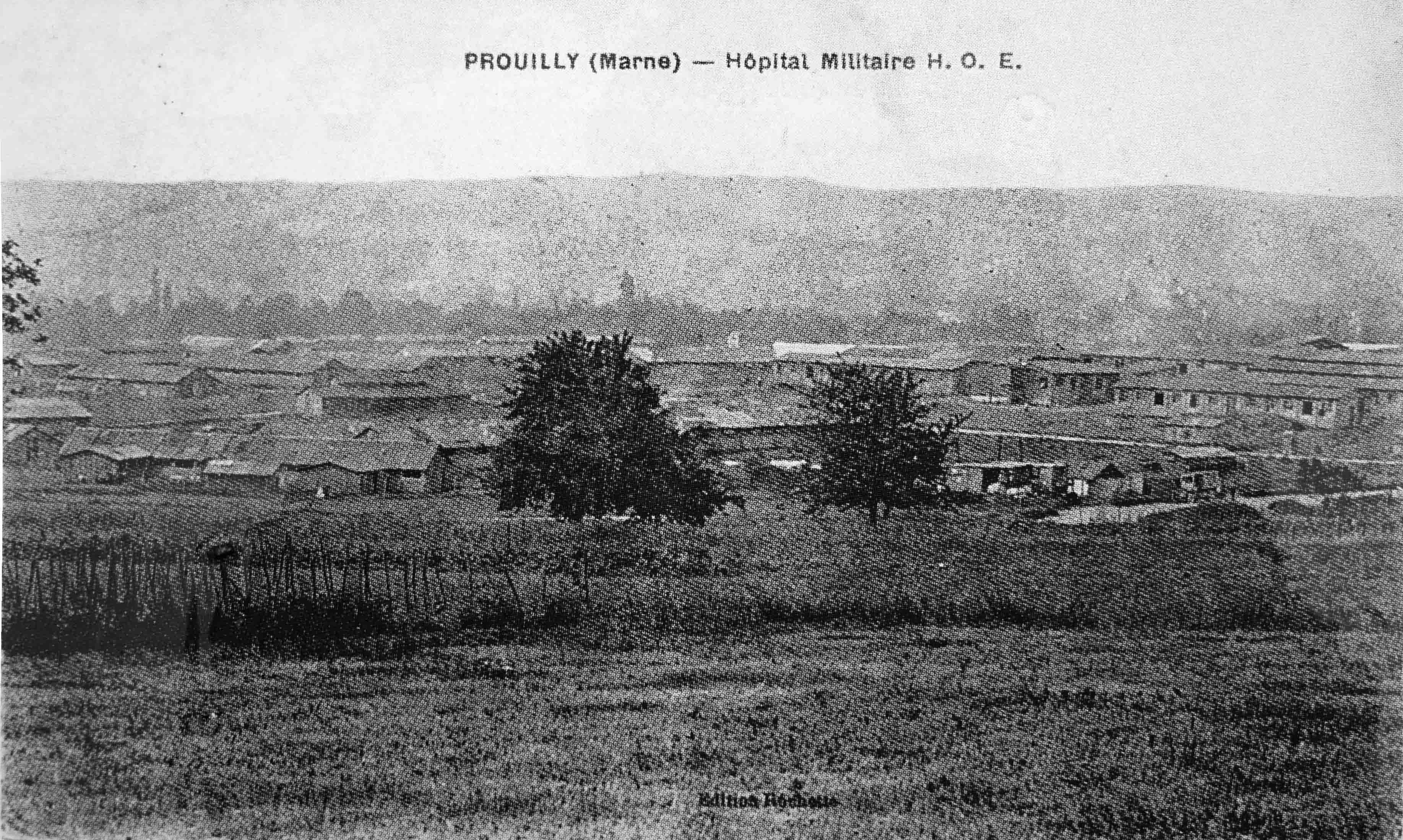 Un_HOE_à_Prouillyen carte postale.